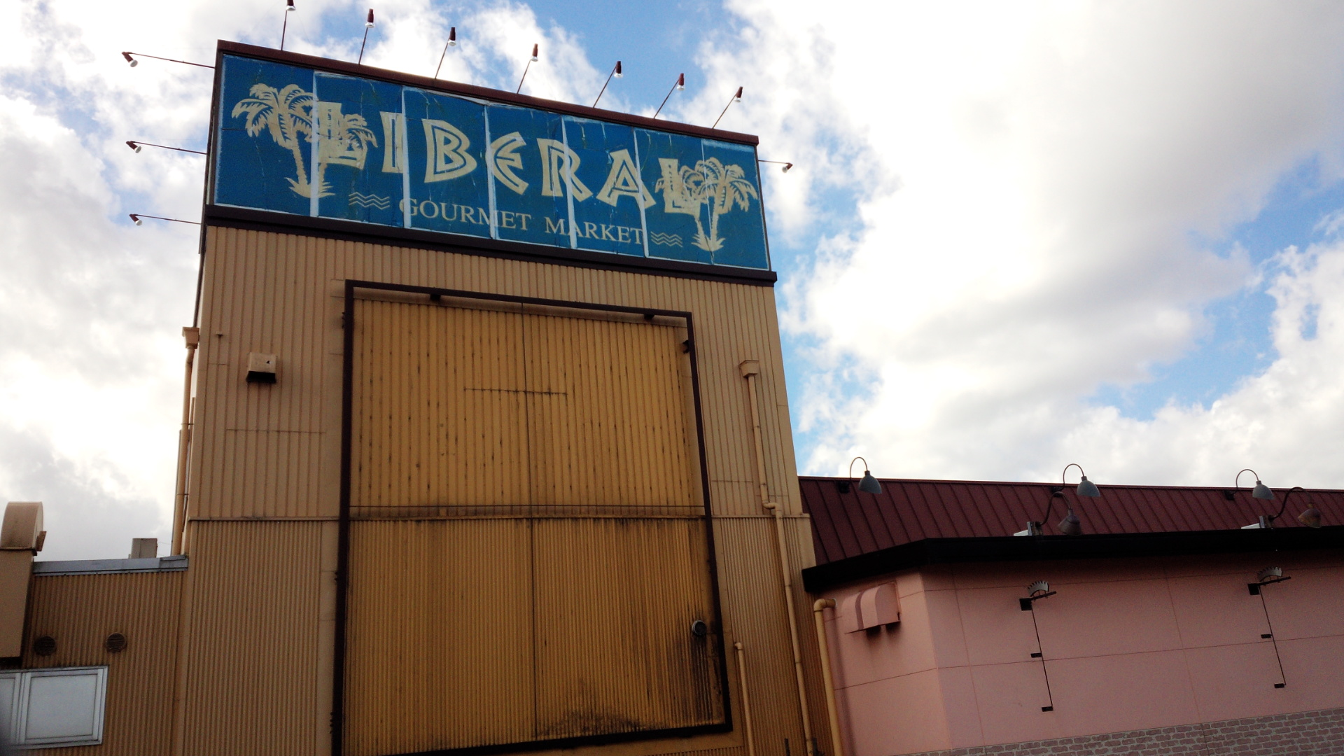 リベラルのロゴ